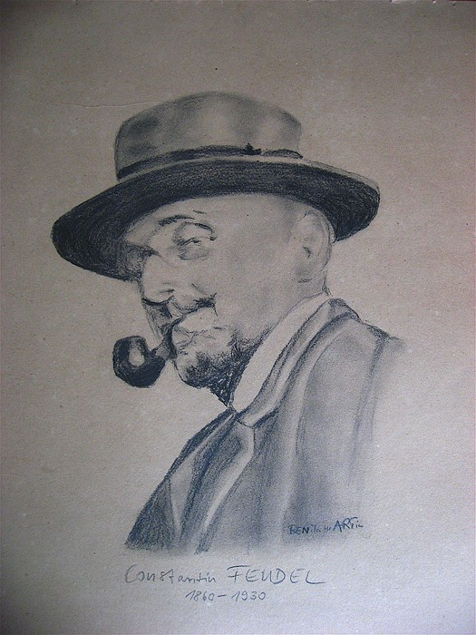 Constantin Feudel Zeichnung von Dr. Benita Martin nach Original um 1920 Erlaubnis zum Hochladen erteilt